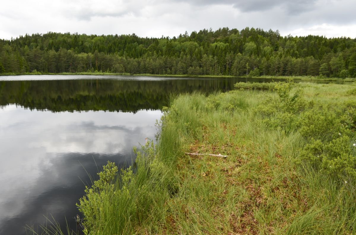 Napperødtjernet er omkranset av myrer og sumpskog.